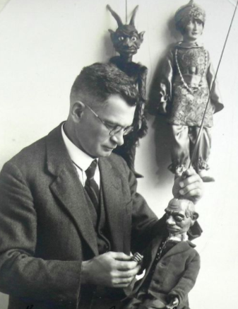 Oříznutá fotka s věnováním